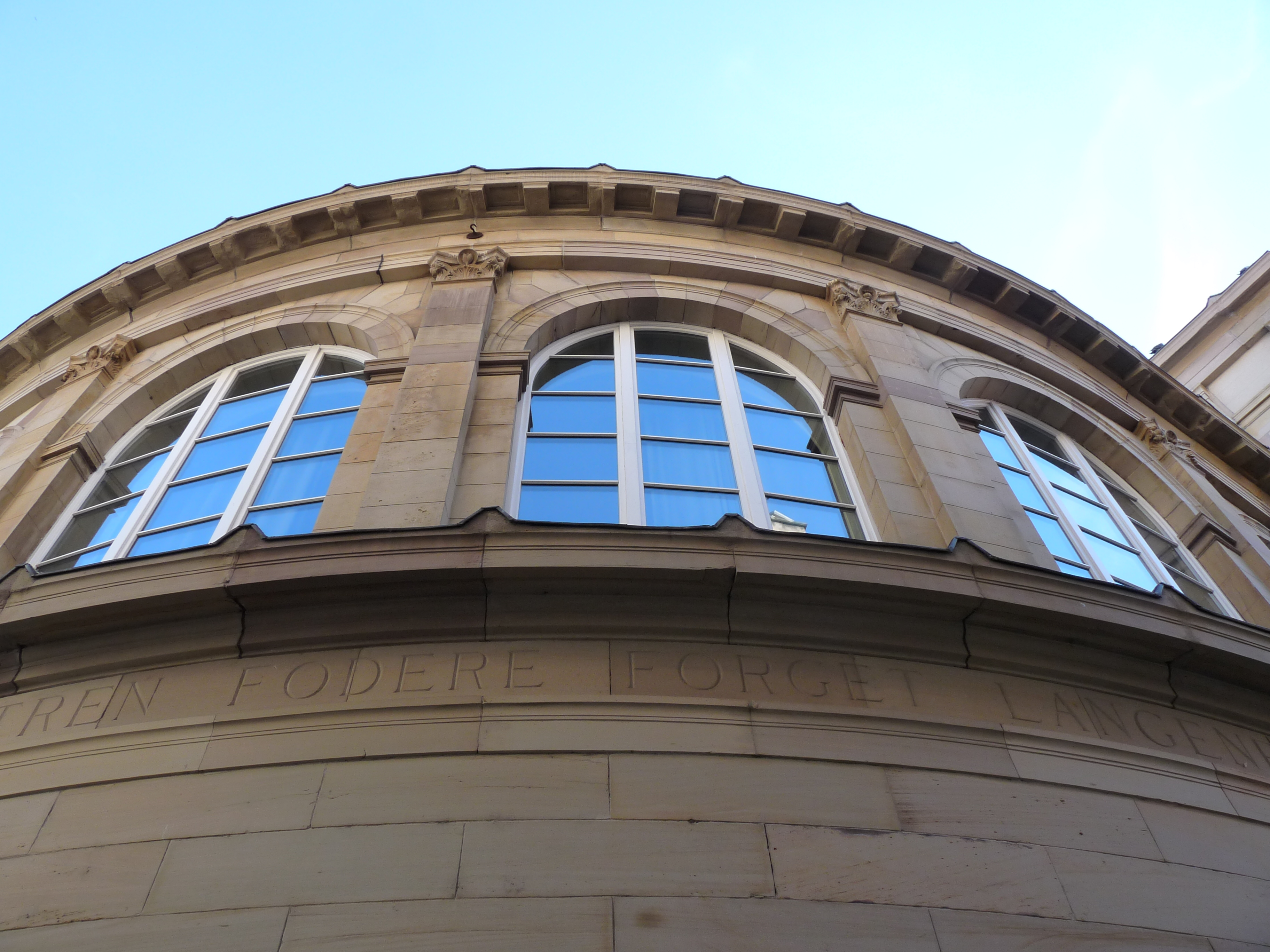 Rotonde de l'ancienne Ecole de Médecine de Strasbourg, 8, place de l'Hôpital, qui abritait l'ancien amphithéâtre. Construction en 1864-1866 par Conrath, architecte en chef de la Ville. Style néo-grec.